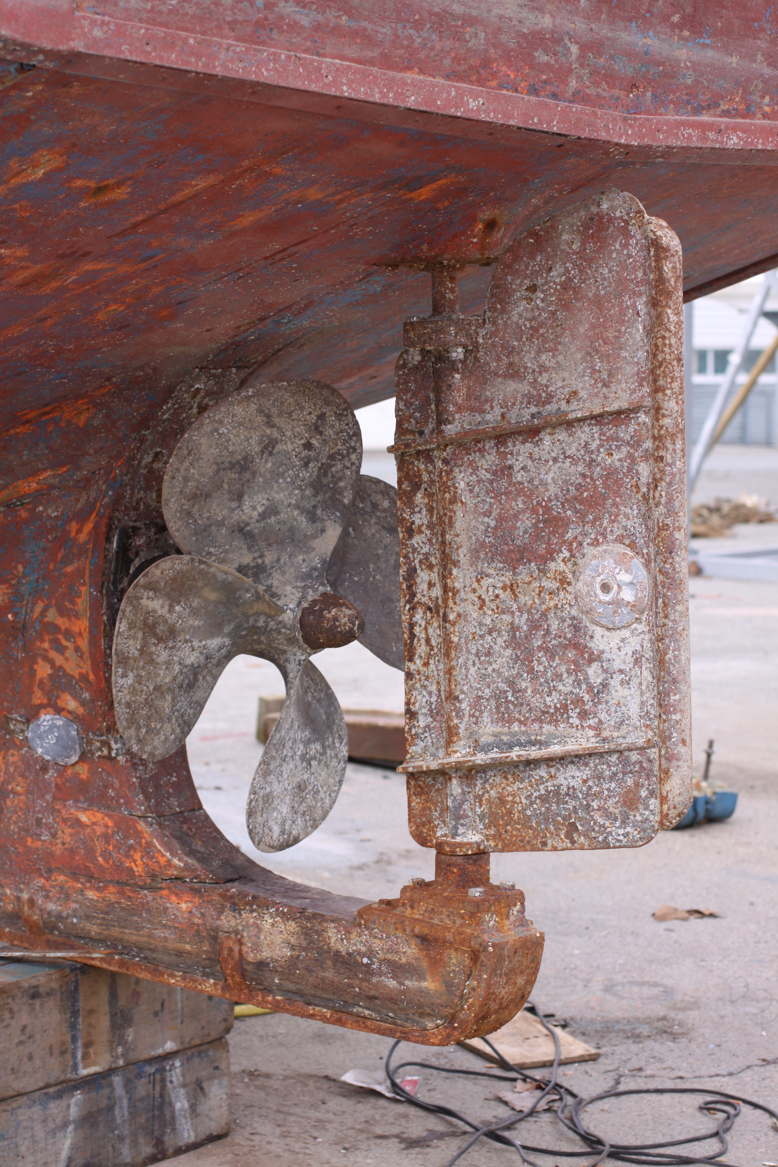 Le safran d'un petit chalutier monté dans une crapaudine (en bas sur le talon de la quille). Une crapaudine est une pièce de métal (palier) qui supporte et guide un axe vertical. C' est le pivot d' un axe vertical, en l' espèce l'axe du safran. Cette photographie a été prise sur un petit chalutier en réparation à La Rochelle (France).